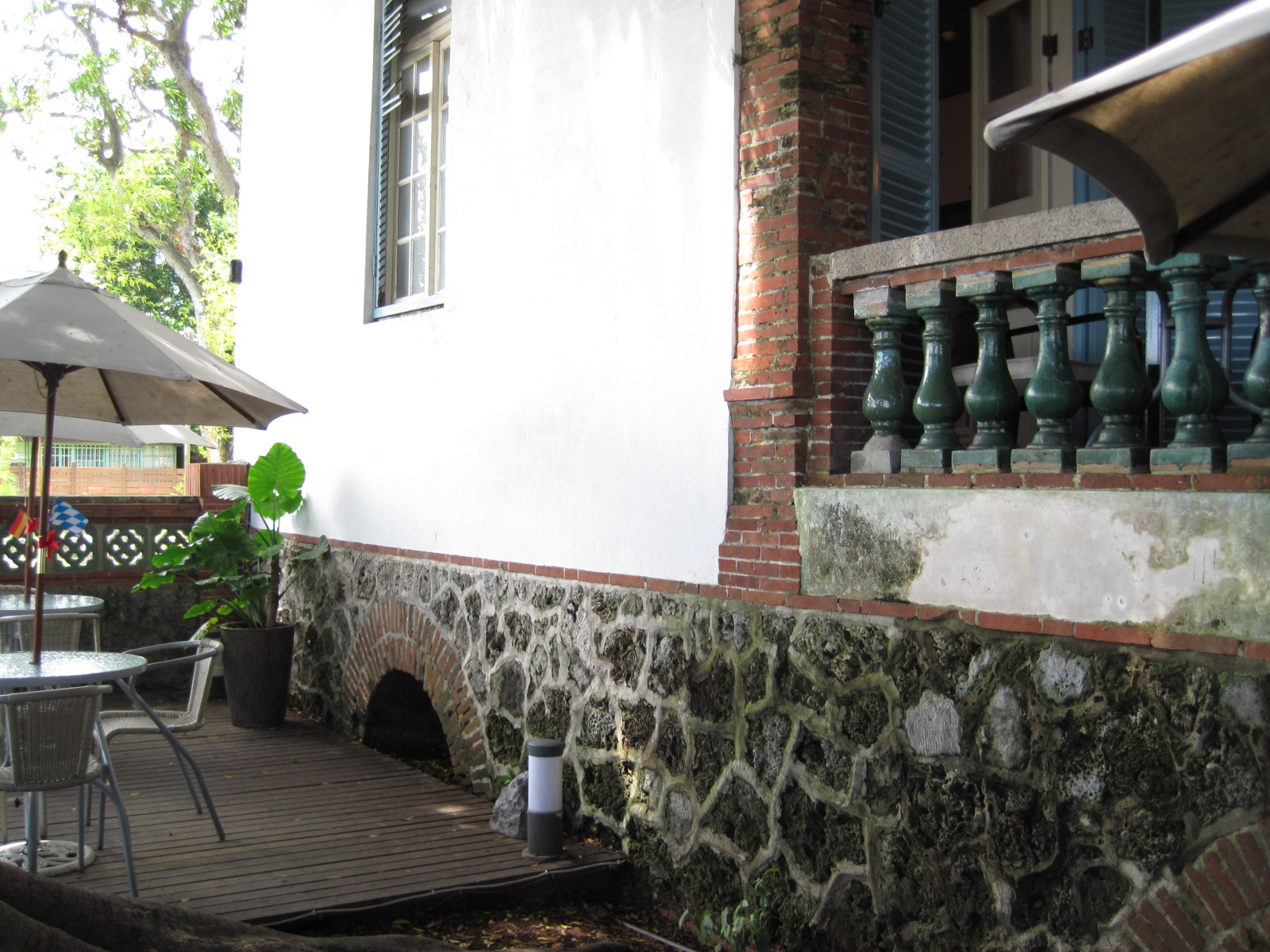 臺南東興洋行基座